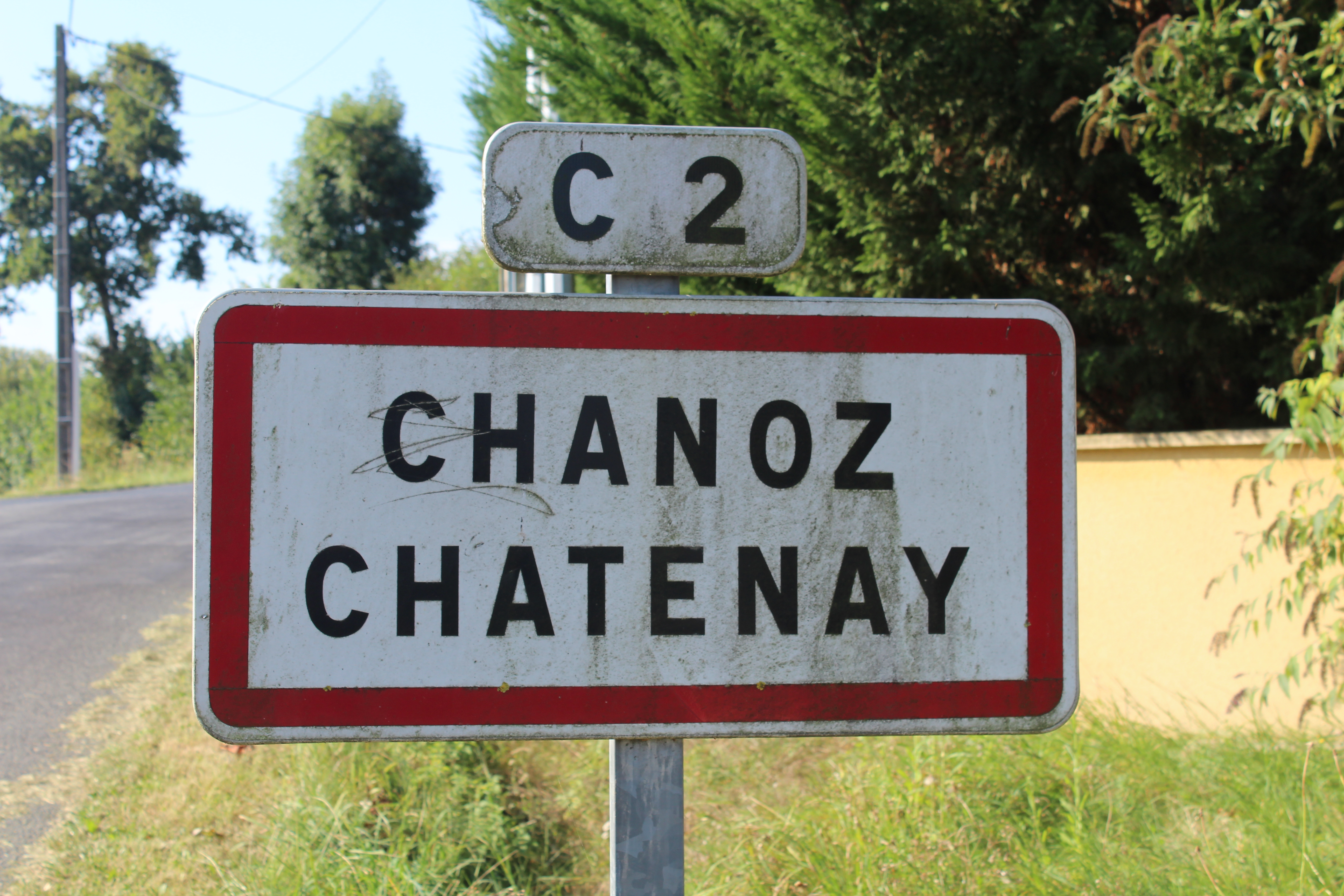 Panneau d'entrée dans le village de Chanoz-Châtenay.